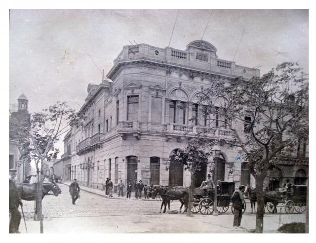 Fachada del Teatro Rivadavia, hoy llamado Teatro Liceo, en la esquina de Rivadavia con Paraná, junto a Plaza Lorea en Buenos Aires. Foto de fines del siglo XIX.